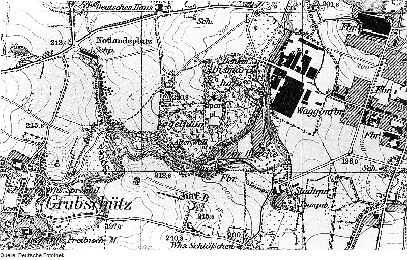 Original image description from the Deutsche Fotothek Bautzen. Meßtischblatt, Sekt. Bautzen, Nr. 4852